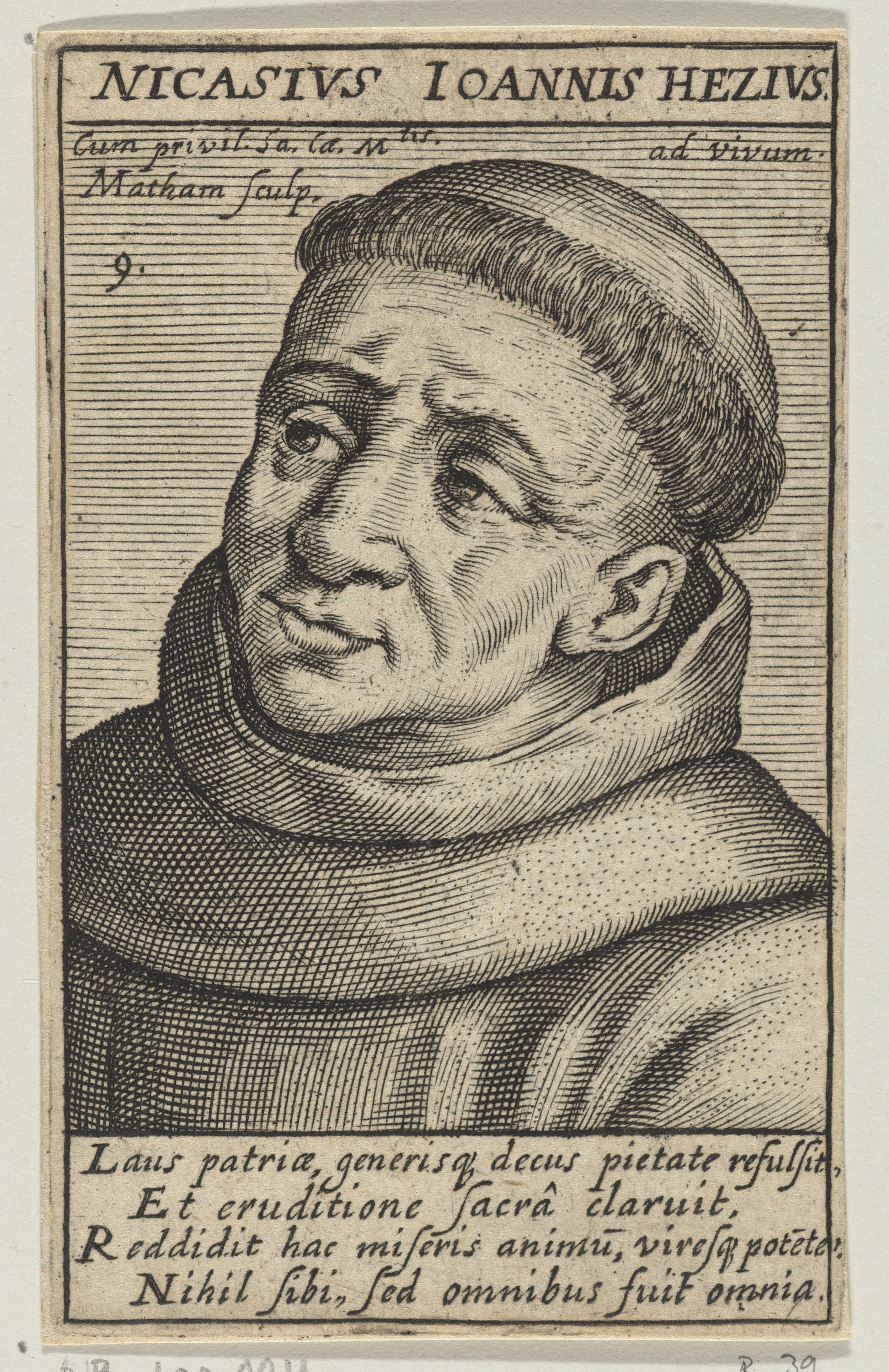 IdentificatieTitel(s): Portret Nicasius Johannes Hezius , een van de martelaren van GorcumDe martelaren van Gorcum (serietitel)Objecttype: prent portret Objectnummer: RP-P-OB-100.004Catalogusreferentie: Bartsch 39Hollstein Dutch 170VervaardigingVervaardiger: prentmaker: Jacob MathamDatering: ca. 1615Fysieke kenmerken: gravureMateriaal: papier Techniek: graveren (drukprocedé)D Verwerving en rechtenCopyright: Publiek domein